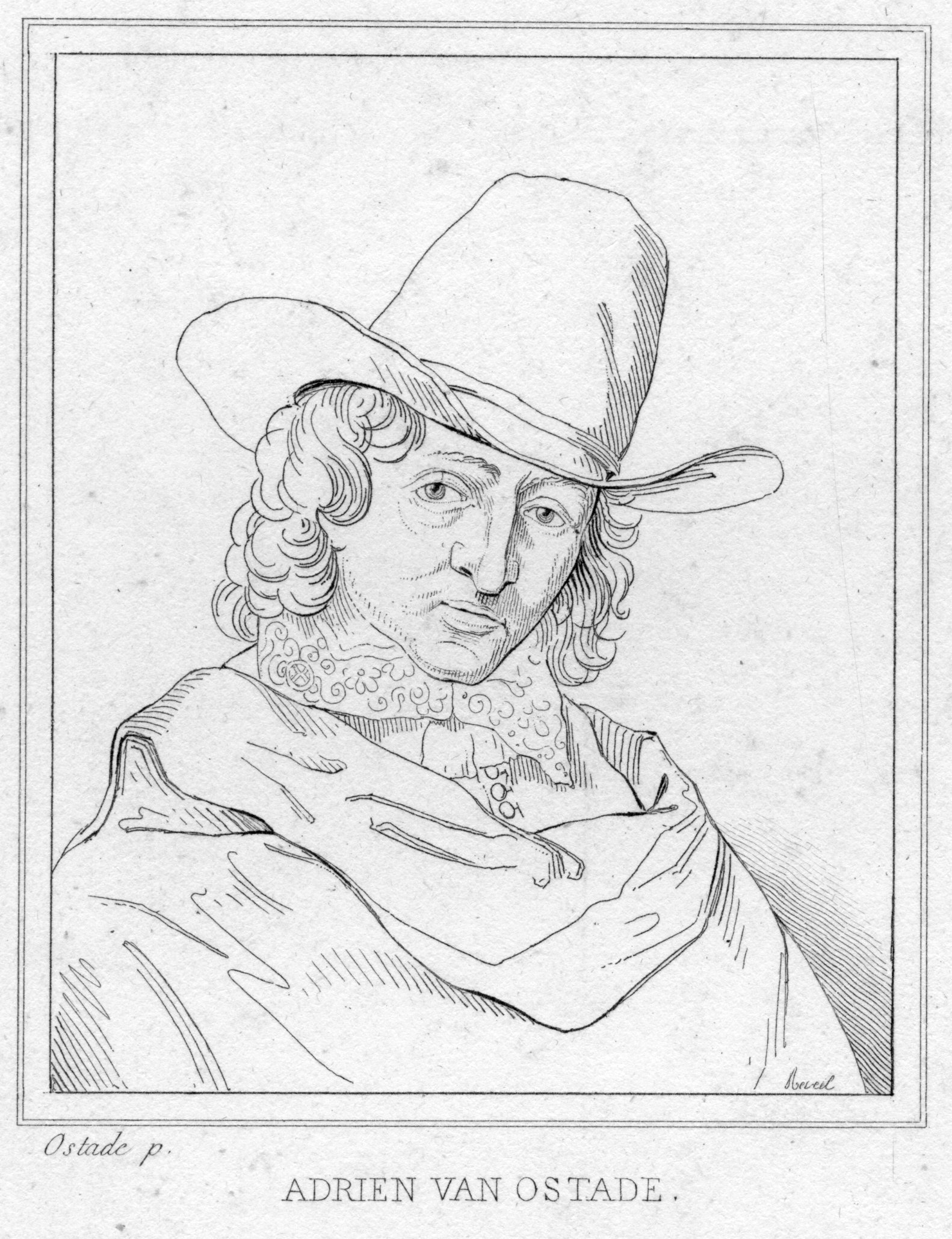 Portrait gravé